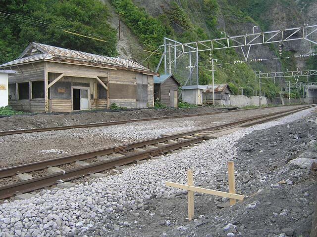 駅の様子